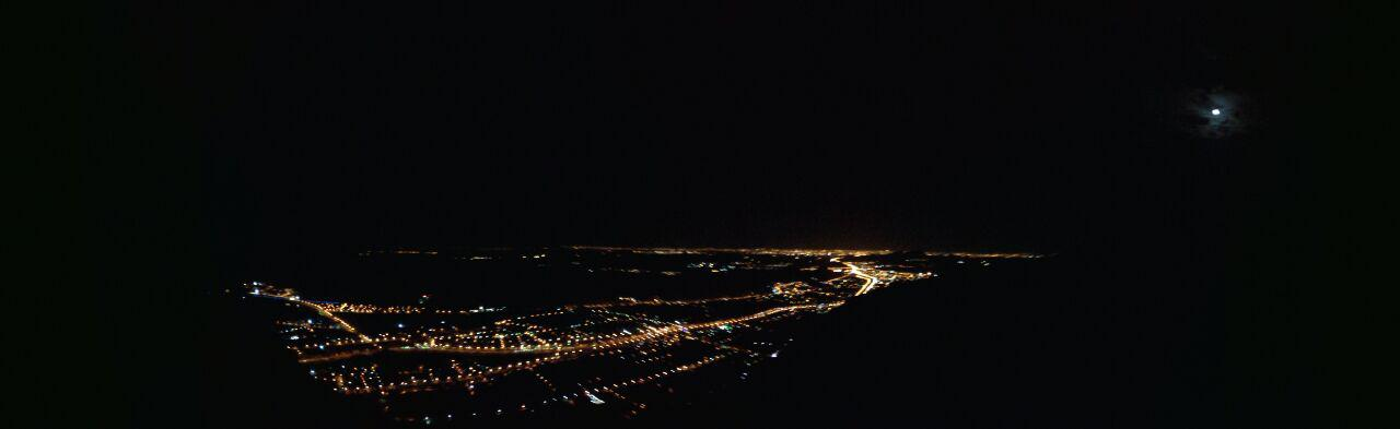 نمایی از شهر تفت در شب از بام تفت